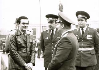 Западный Берлин Тиргартен 1983. Муслим Магомаев, В. Линде, А. Дорофеев, А. Денисов на возложении.